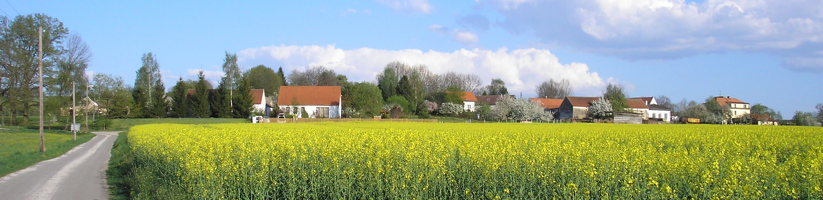 Dolní Stropnice, část obce Římov